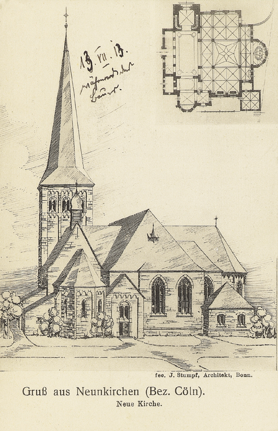 Saint Margareta Neunkirchen-plan and view of newgotic part (1913)